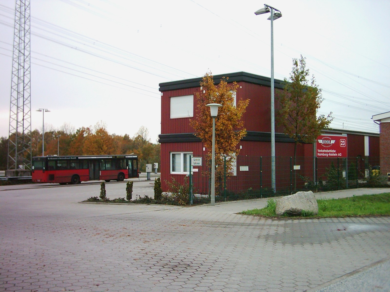 Betriebshof der Verkehrsbetriebe Hamburg–Holstein AG (VHH) in Hamburg-Rahlstedt, Gewerbegebiet Höltigbaum. Siehe auch Image:Betriebshof VHH Rahlstedt 02.jpg